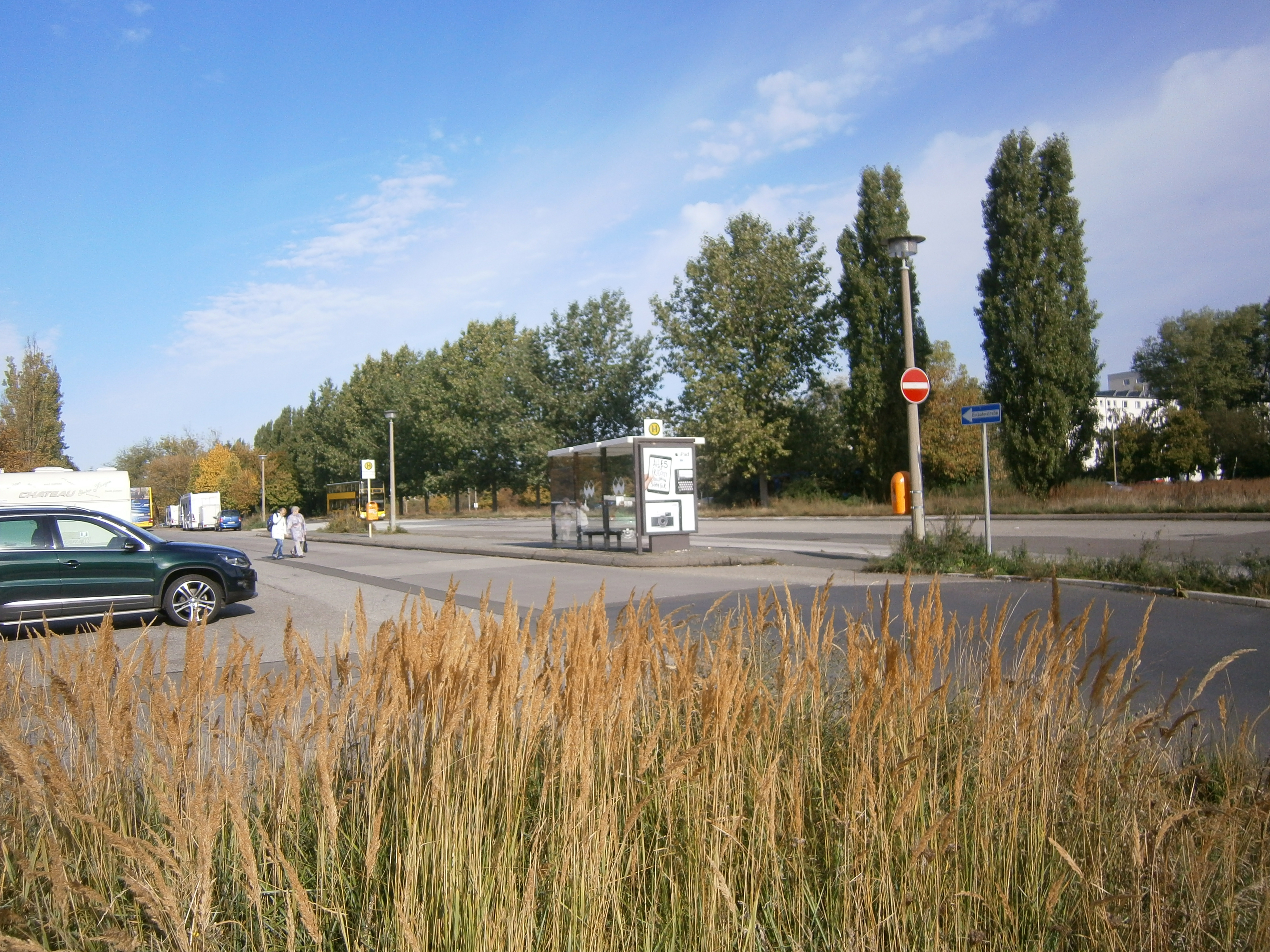 Die Michelangelostraße ist eine Straße im Ortsteil Berlin-Prenzlauer Berg. Hier der Blick von der Grünfläche südlich der Straße über den Buswendeplatz.